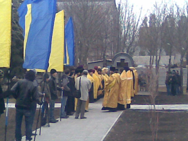 День пам'яті жертв Голодомору в Луганську: фото акції в парку біля Луганського національного університету